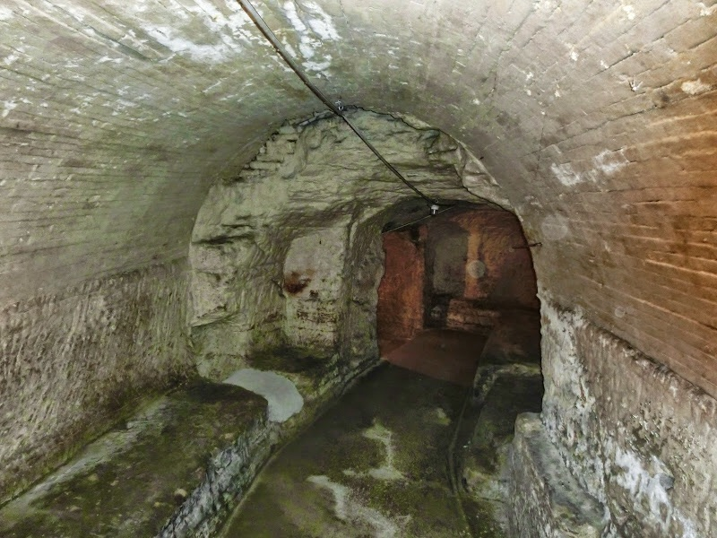 Deutschland - Baden-Württemberg - Landkreis Sigmaringen - Pfullendorf: im Rössle-Keller-Keller